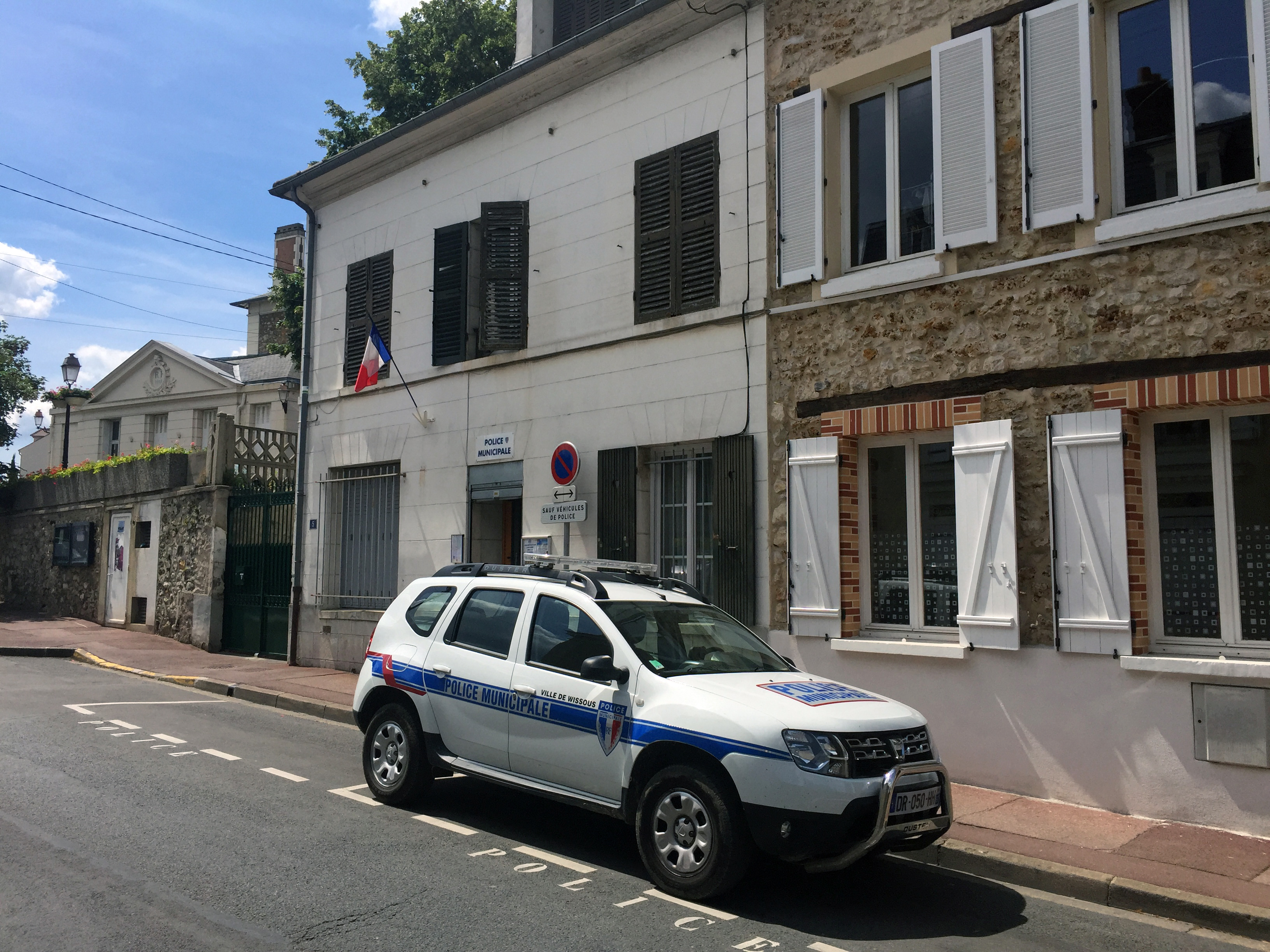 Police municipale de Wissous.